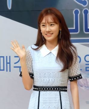 18일 오후 서울시 양천구 목동 SBS에서 SBS 새 금토드라마 '의사 요한' 제작발표회가 열려 배우 지성X이세영X이규형X황희X정민아X김혜은X신동미가 참석해 개별 포토타임을 갖고 있다.